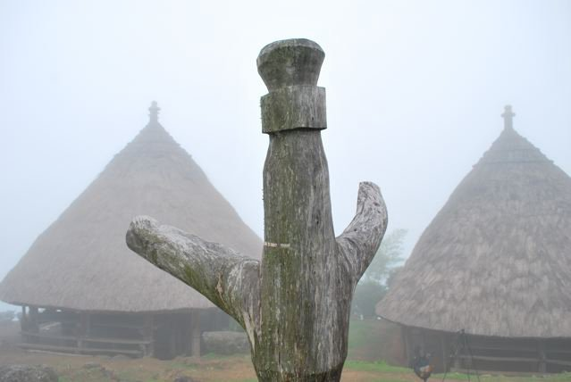 Totem in Hohulu, Maubisse, von Manuel Tilman aufgestellt.